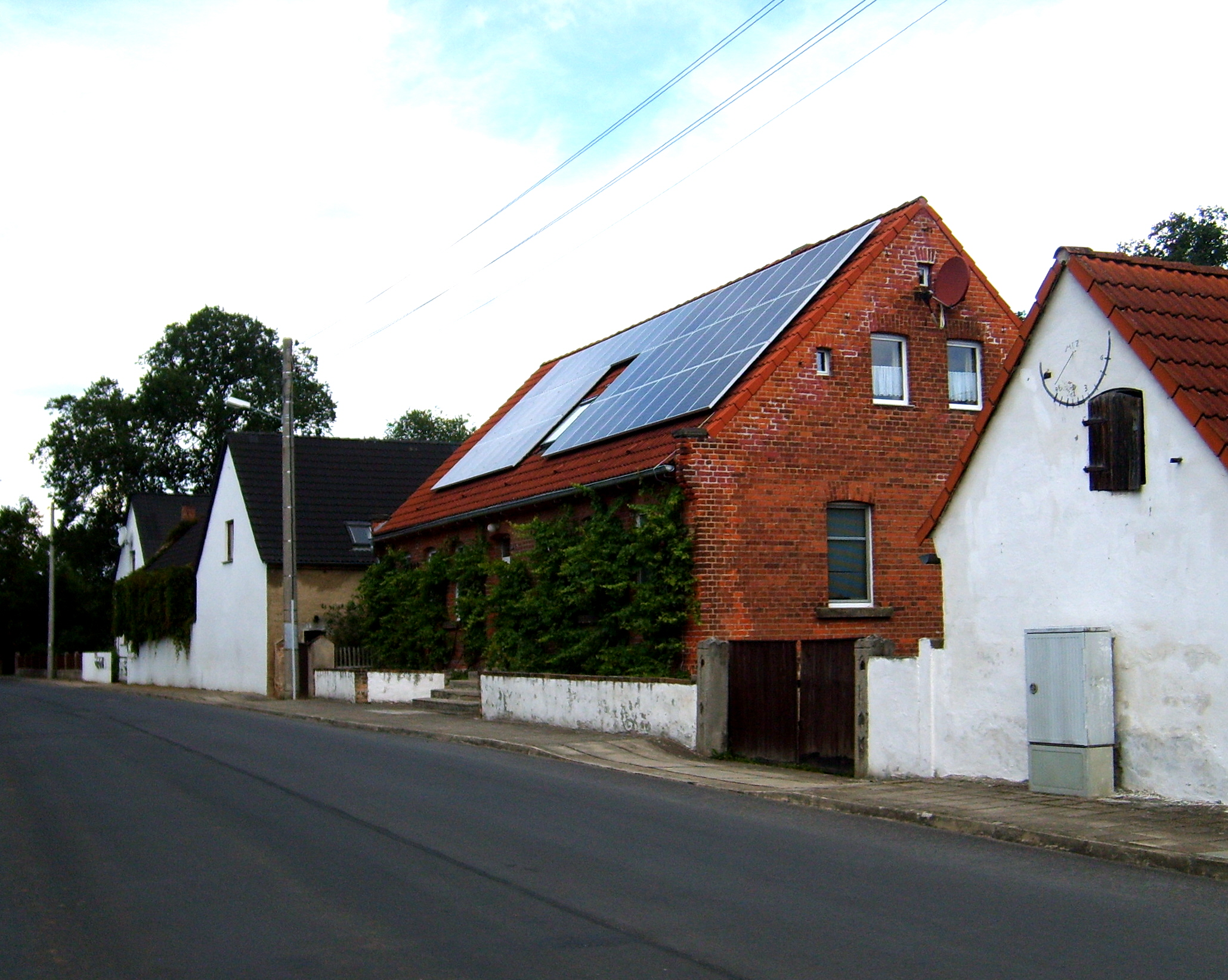 Alte Schule Würdenhain 2009